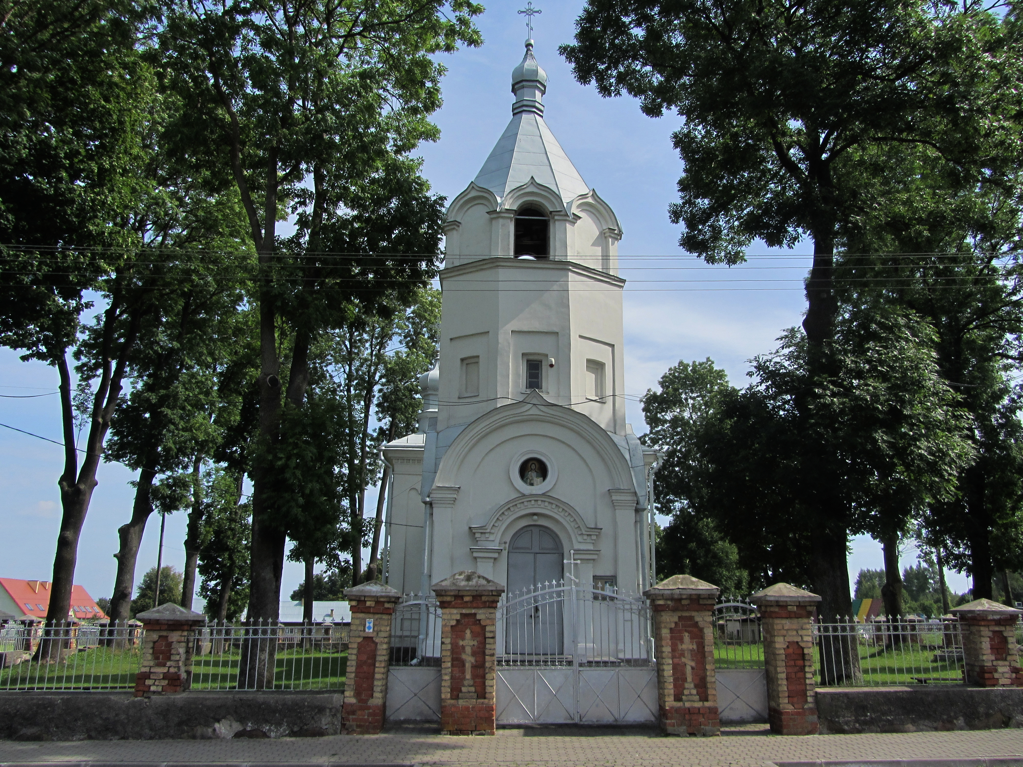 Cerkiew z ogrodzeniem w zespole cerkwi prawosławnej p.w. Podwyższenia Krzyża - Fasty, Dobrzyniewo Duże 09.1983.